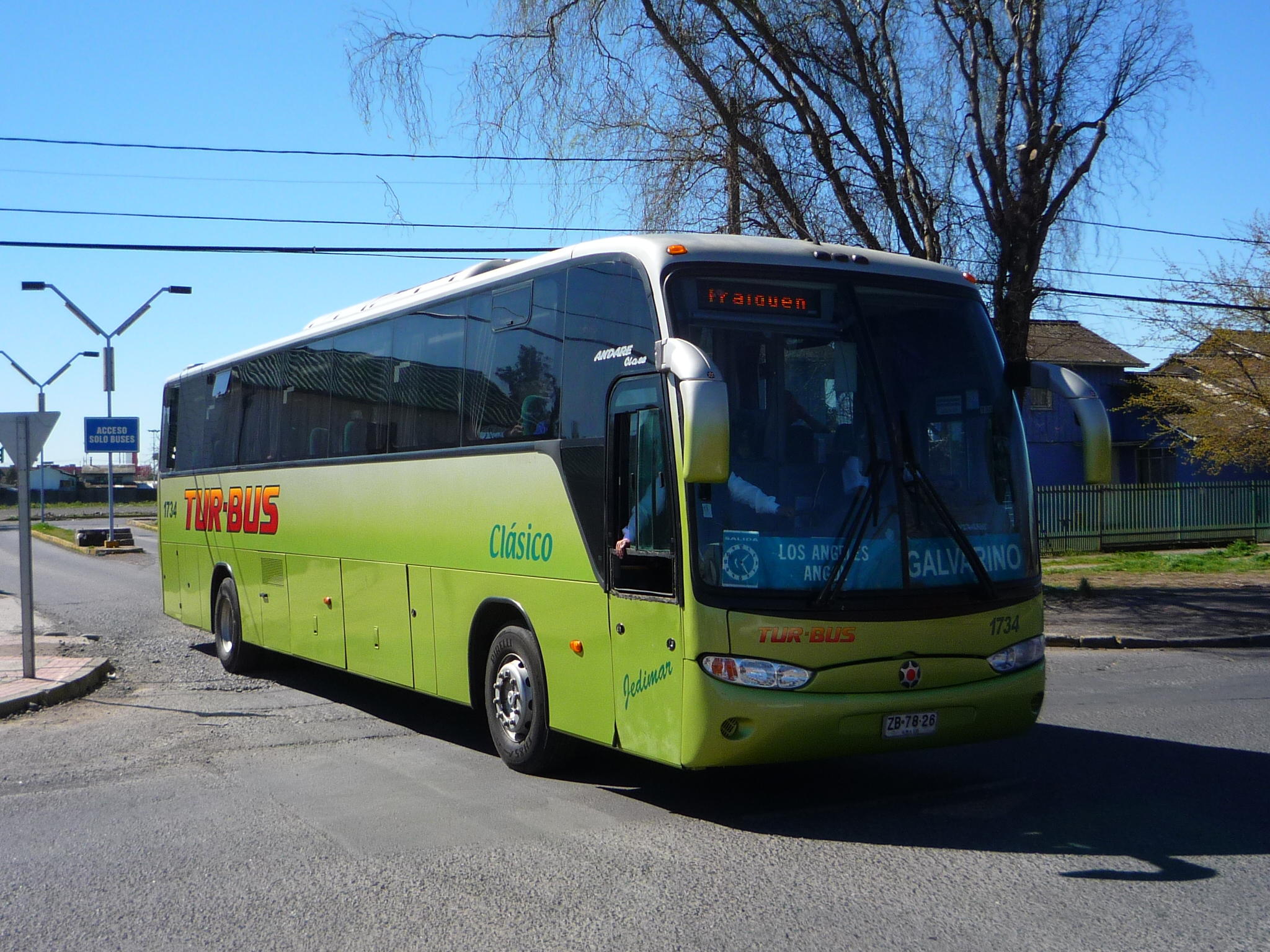 Máquina similar a la accidentada en el Río Tinguiririca, Terminal María Teresa Chillán.